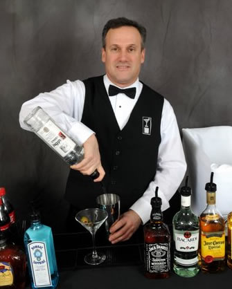 Robert Gold Bartender